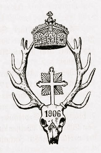 Auszeichnung der 2. Kompanie für das beste Schießergebnis im Jg. 1906